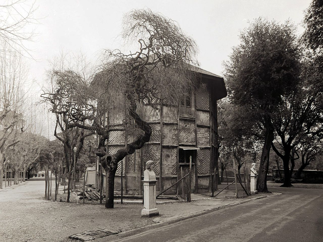 Roma, Pincio, Serbatoio e Padiglione di Gioacchino Ersoch